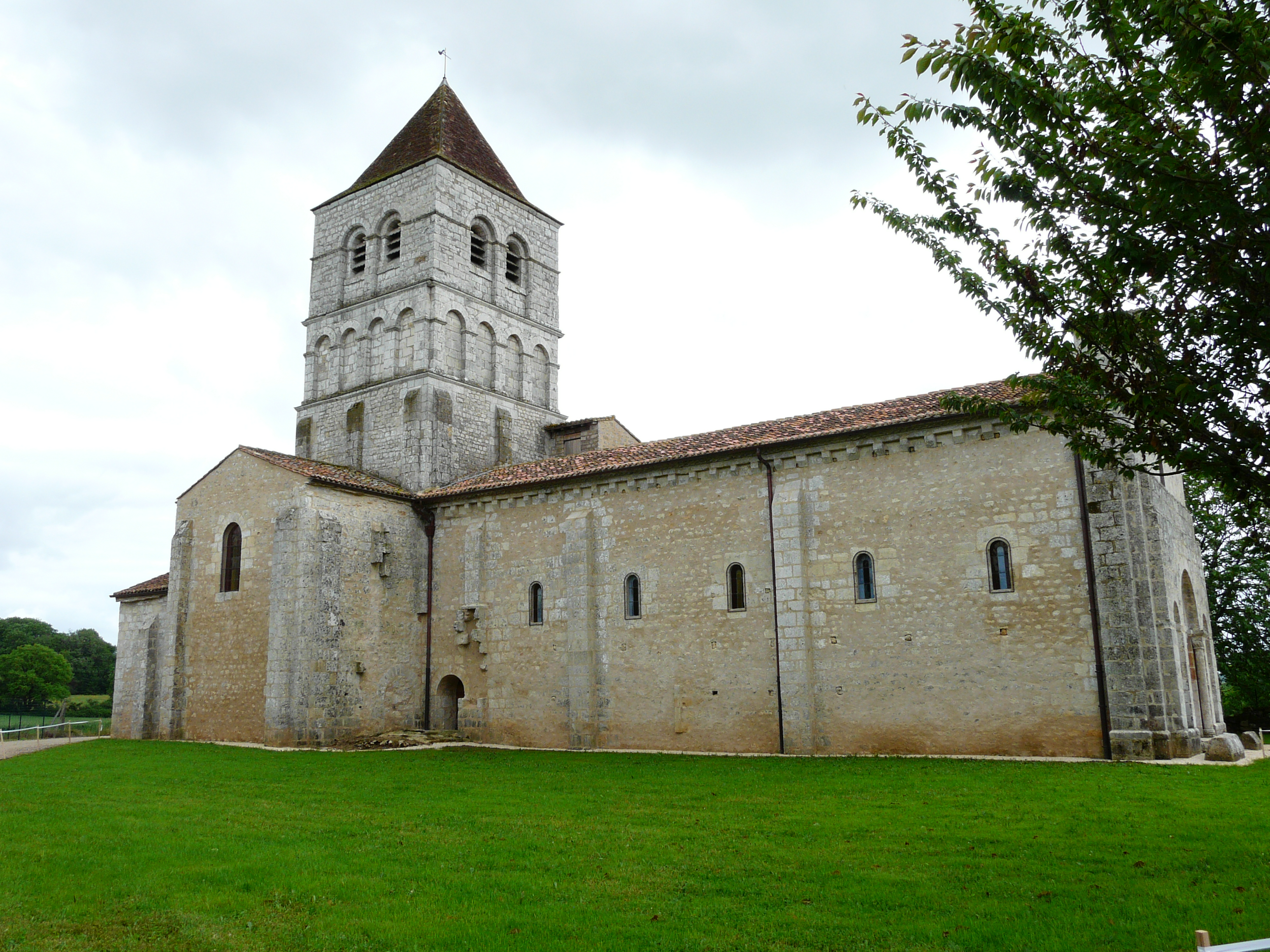 L'église Saint-Robert, Javerlhac-et-la-Chapelle-Saint-Robert, Dordogne, France. Object location45° 34′ 16.3″ N, 0° 31′ 05″ E